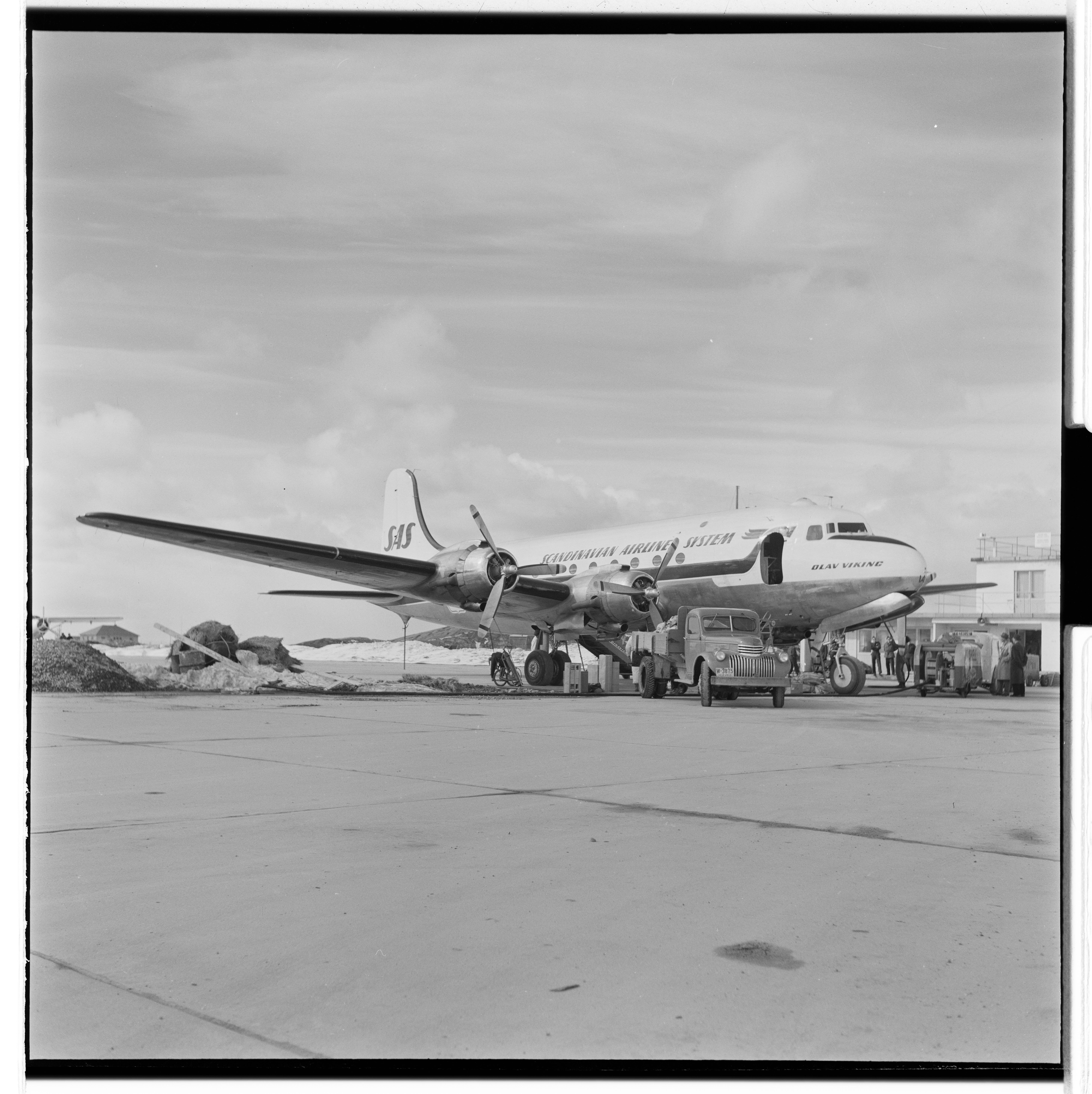 Flyvende hurtigrute Oslo - Kirkenes. NÅ nr. 21, 1955